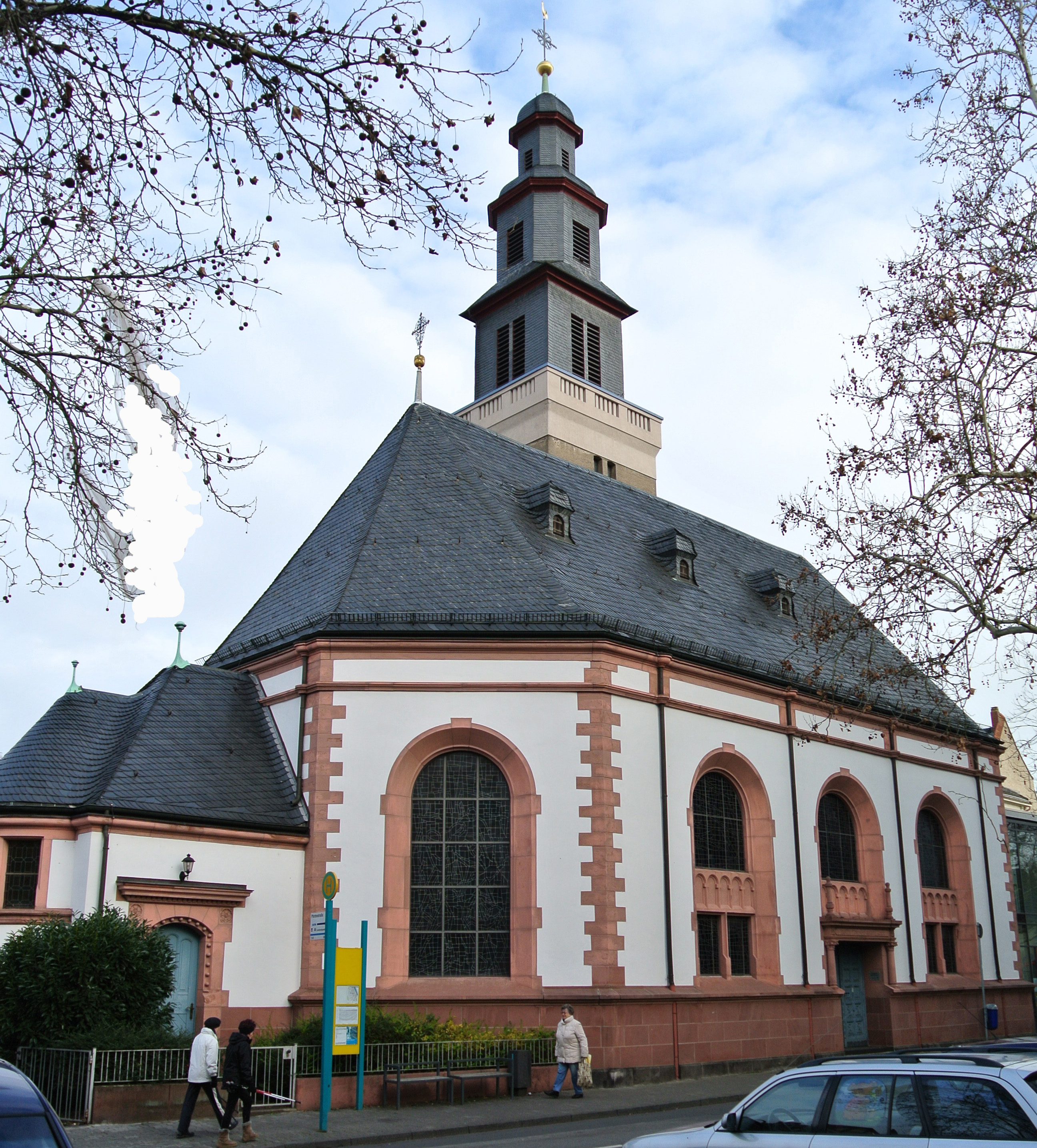 Evangelische Melanchtonkirche in Frankfurt-Fechenheim, Pfortenstraße 4; Bauzeit 1771-1772, 1928-1930, 1961; barocke Saalkirche; Baudenkmal